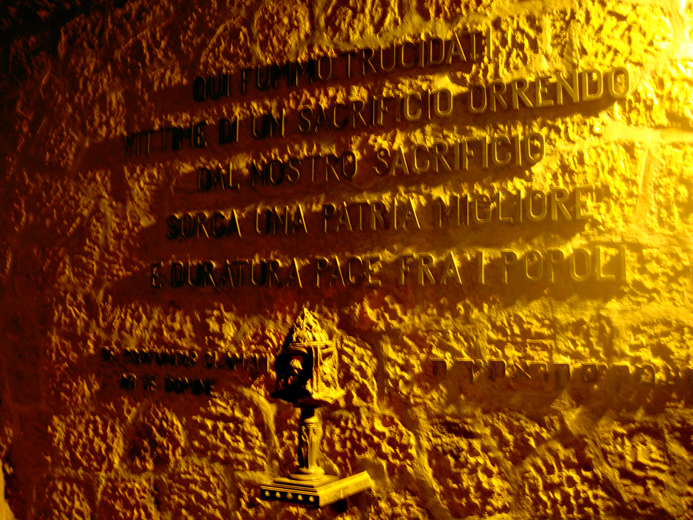 Fosse Ardeatine, Roma, Italia